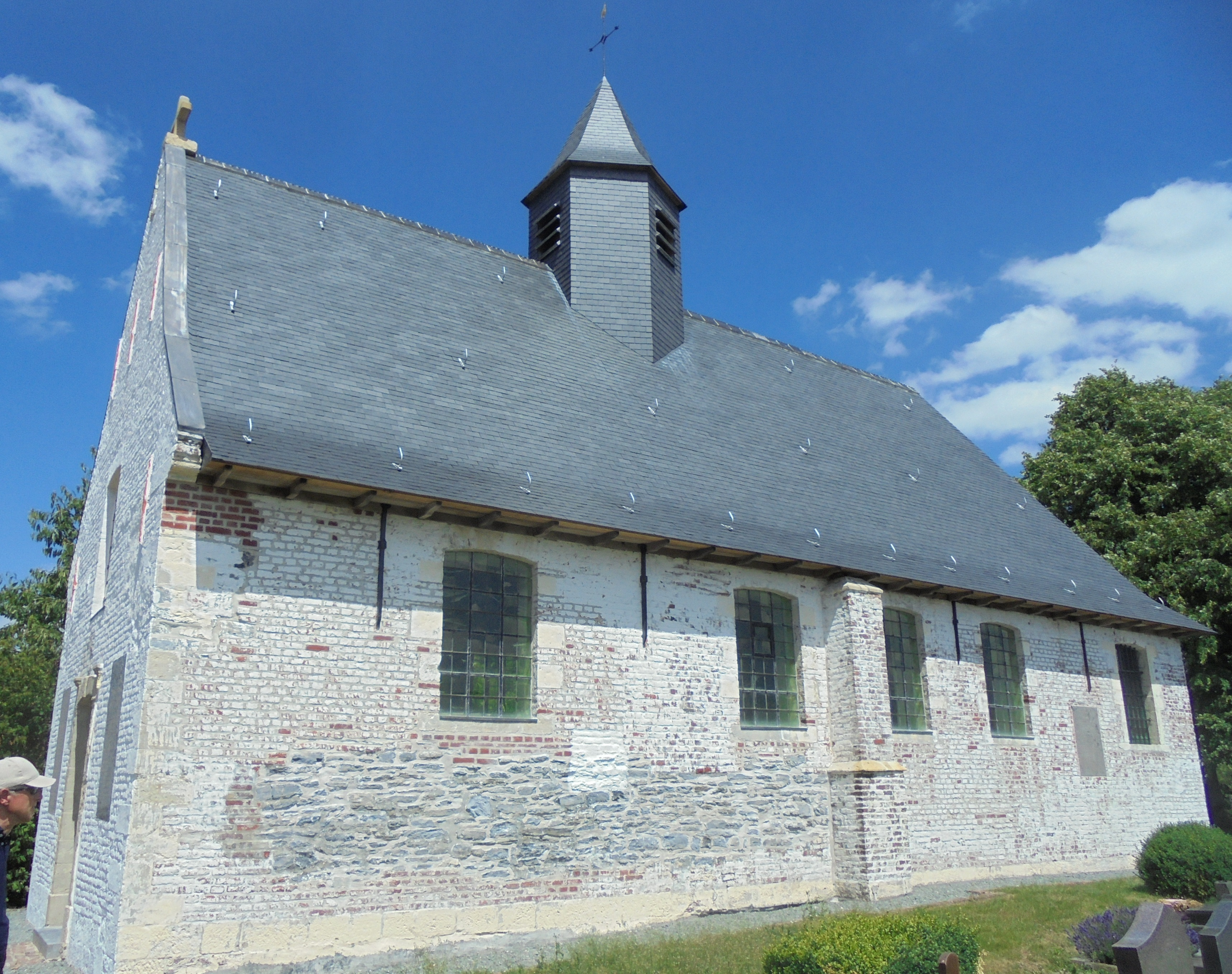 Sint-Margarethakapel - Wijlegem - Sint-Denijs-Boekel - Zwalm - Oost-Vlaanderen - België